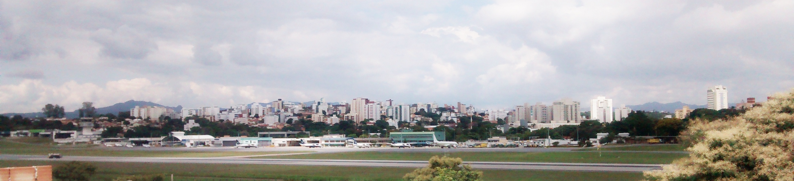 Vista panorâmica do Aeroporto da Pampulha.